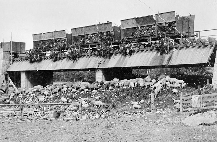 Svinen på Lövsta renhållningsverk får sig ett skrovmål när sopvagnar lossas.